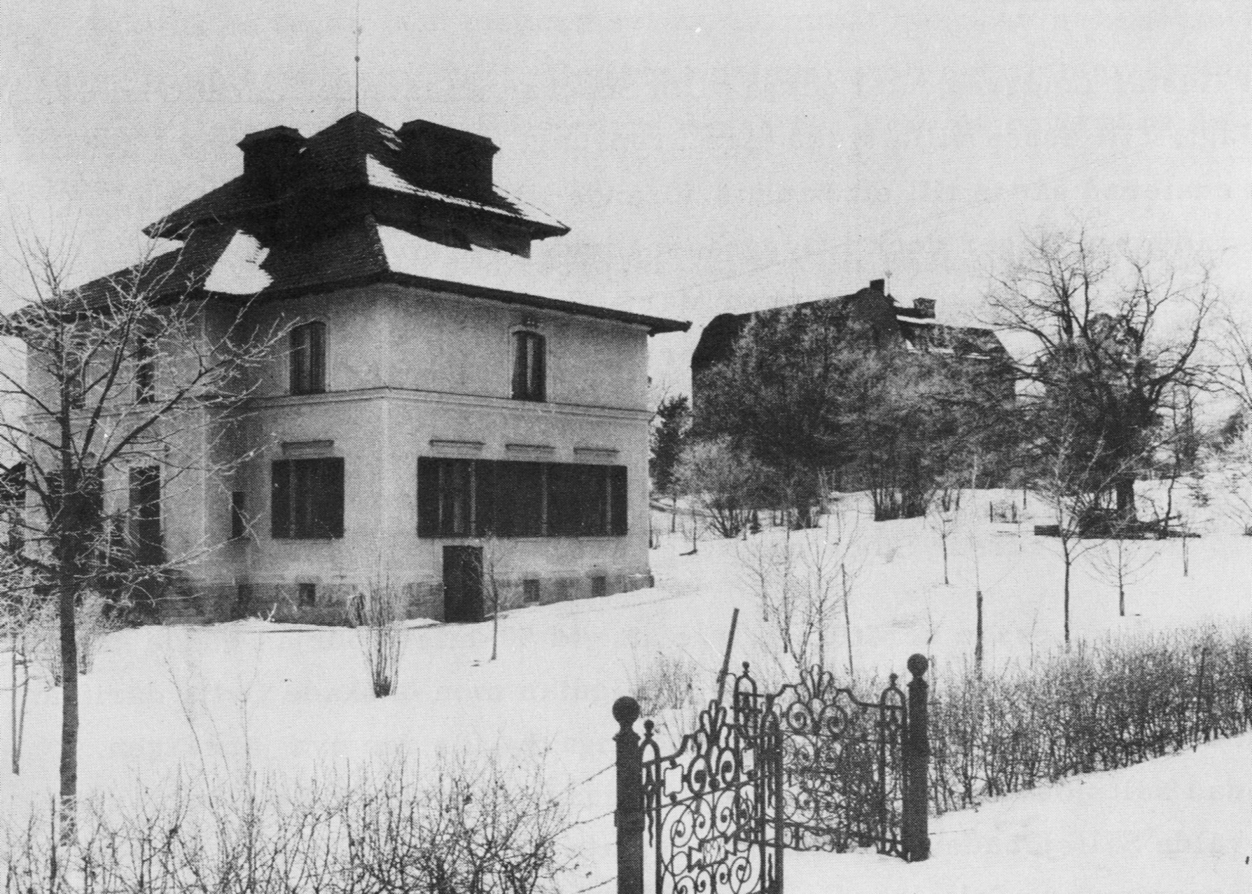 Villa Snäckan i Saltsjöbaden, byggherre Edvard Casparsson, arkitekt Gustaf Lindgren